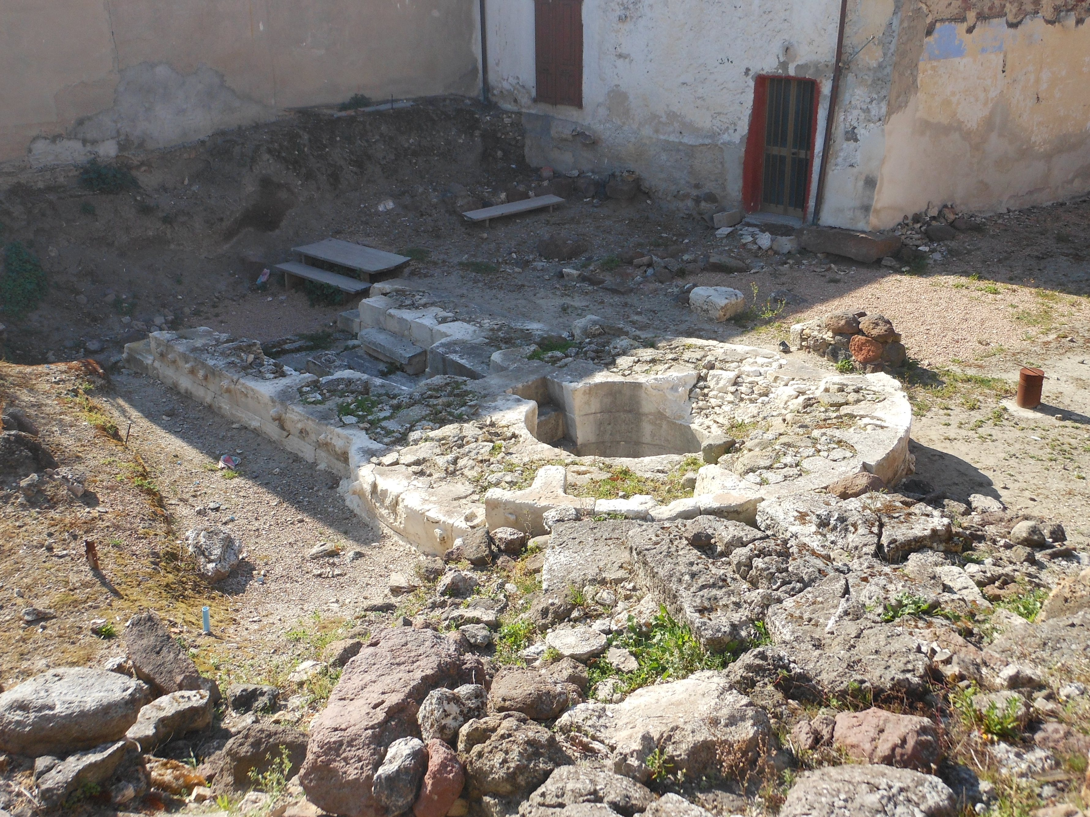 Perfugas, Sardegna, Italia